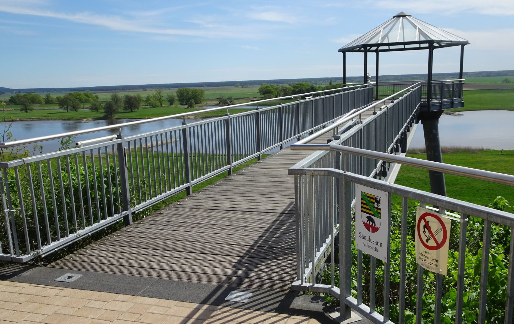 Außenstelle des Standesamtes Arneburg